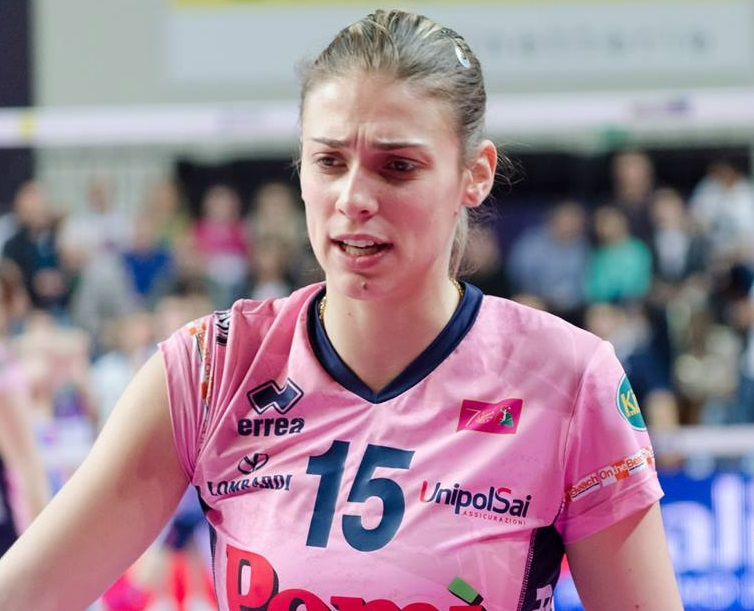 Pallavolista serba, gioca nel ruolo di centrale